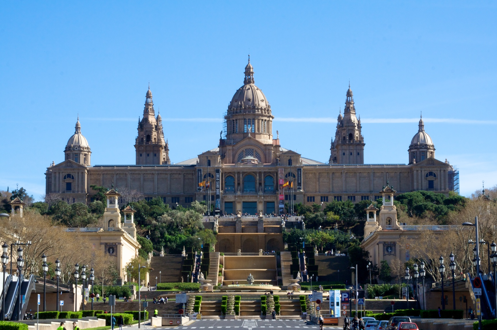 Museu Nacional d'Art de Catalunya